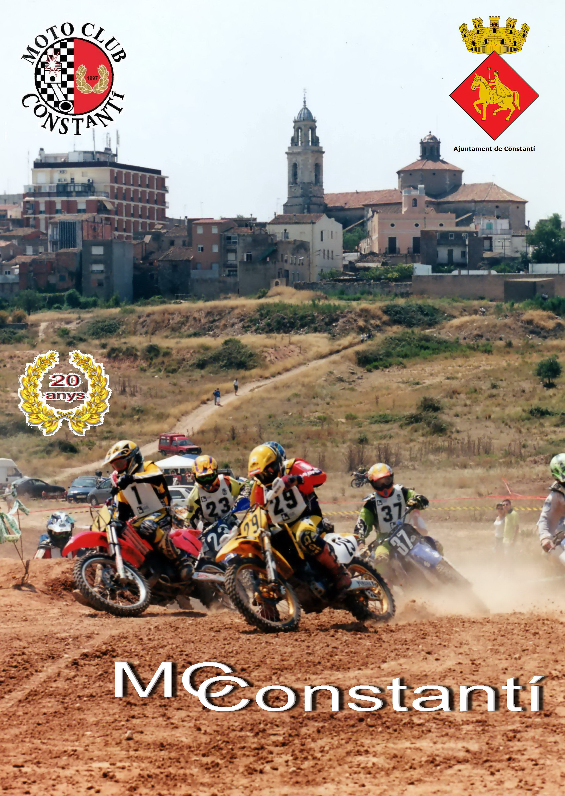 1997-2017 Moto Club Constantí 20 anys